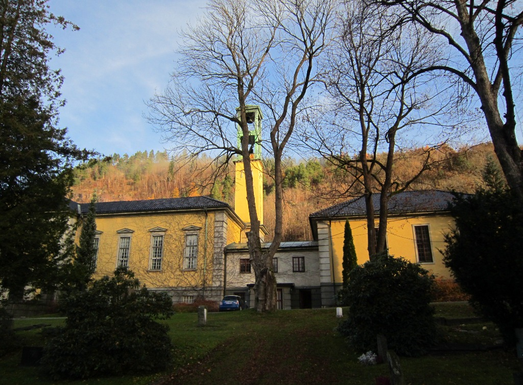 Drammen krematorium